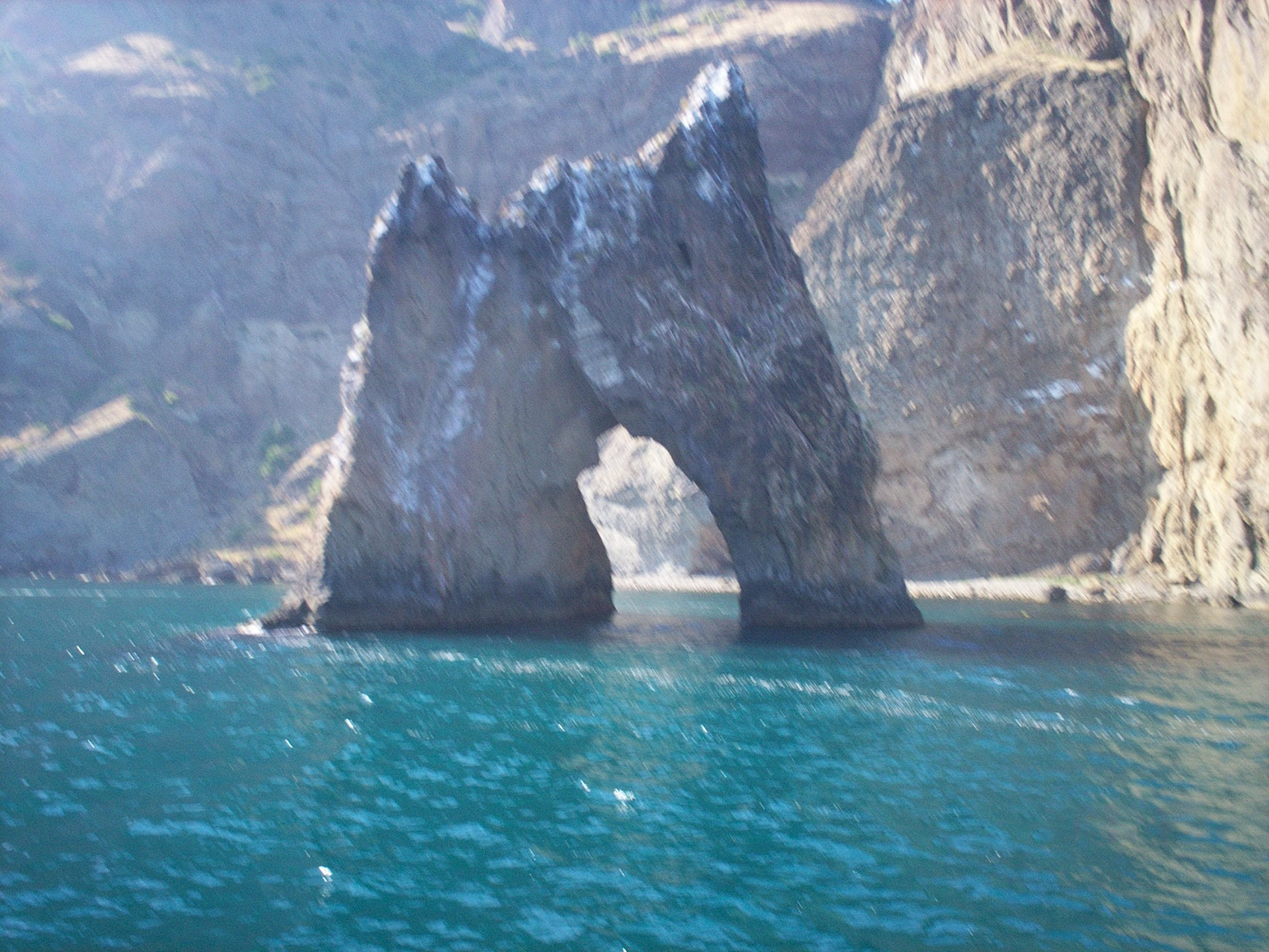 Базальтовая арка "Золотые ворота" в Коктебельской бухте